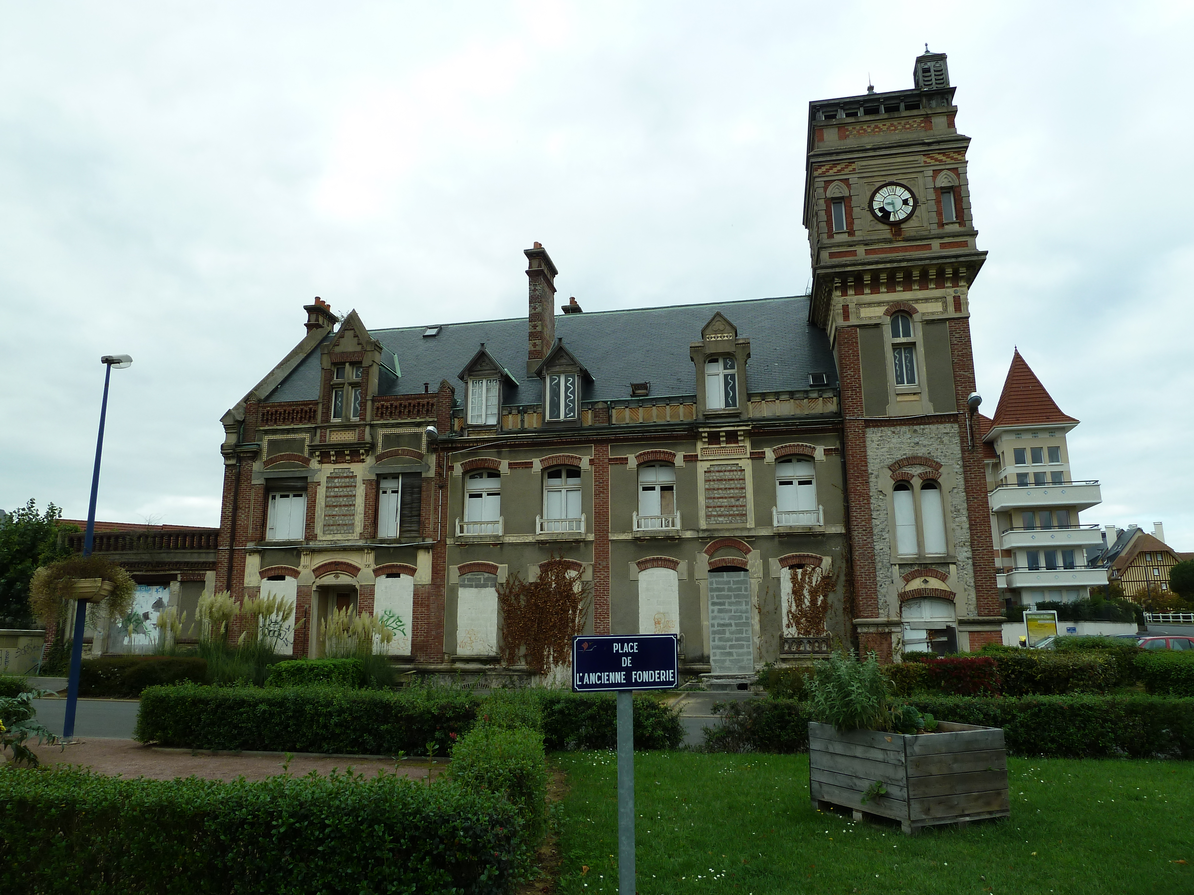 Ancienne usine Tréfimétaux – Dives-sur-Mer – Calvados – France – Mérimée PA14000076 .